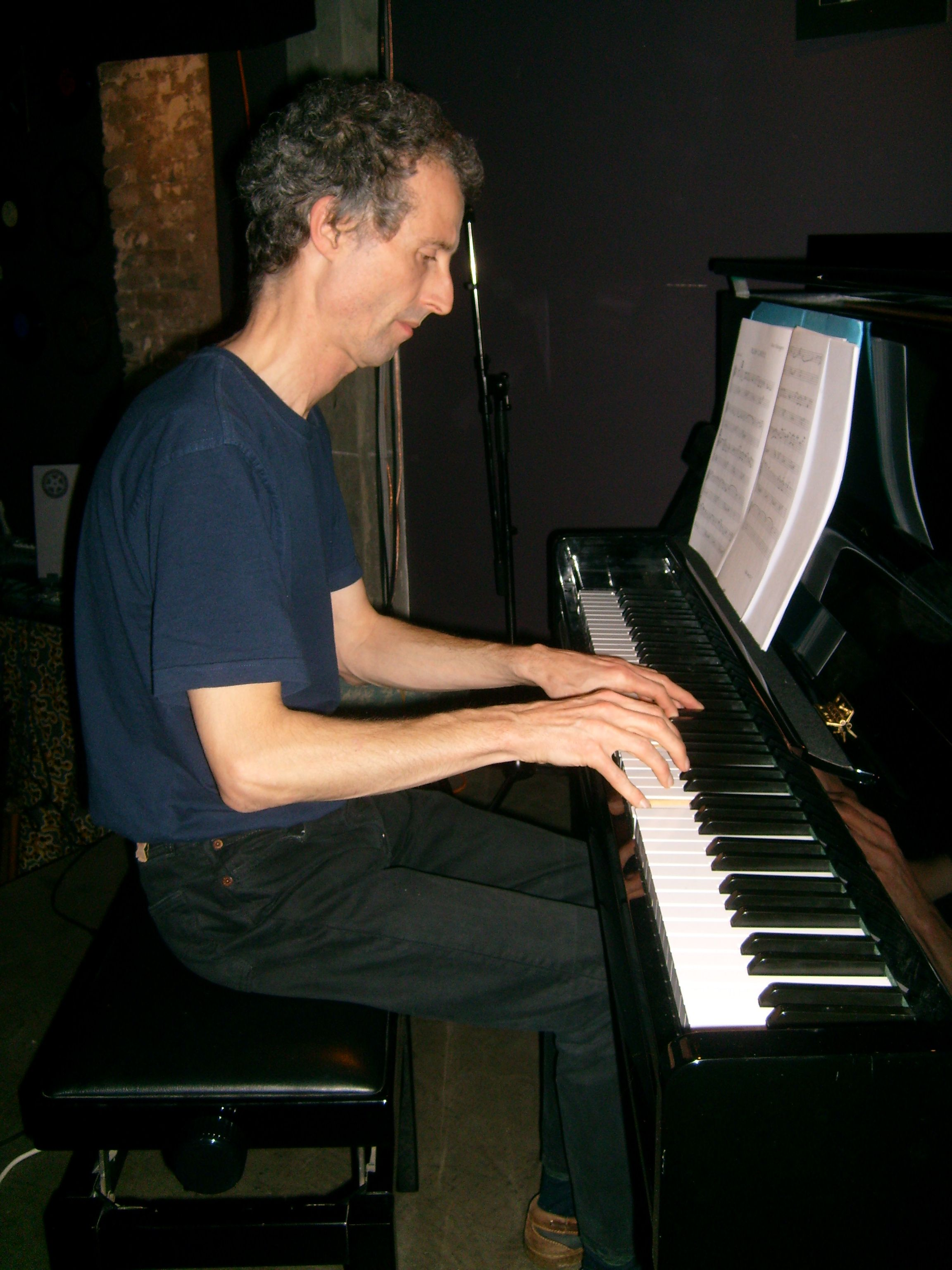 Luxembourg Jazz pianist Marc Mangen at Ancien cinéma café-club in Vianden, Luxembourg